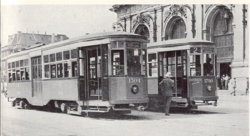 Le vetture 1504 e 1790 davanti alla vecchia Stazione Centrale. La 1504 è l'unica vettura di serie di cui si abbia documentazione certa sulla livrea, gialla.